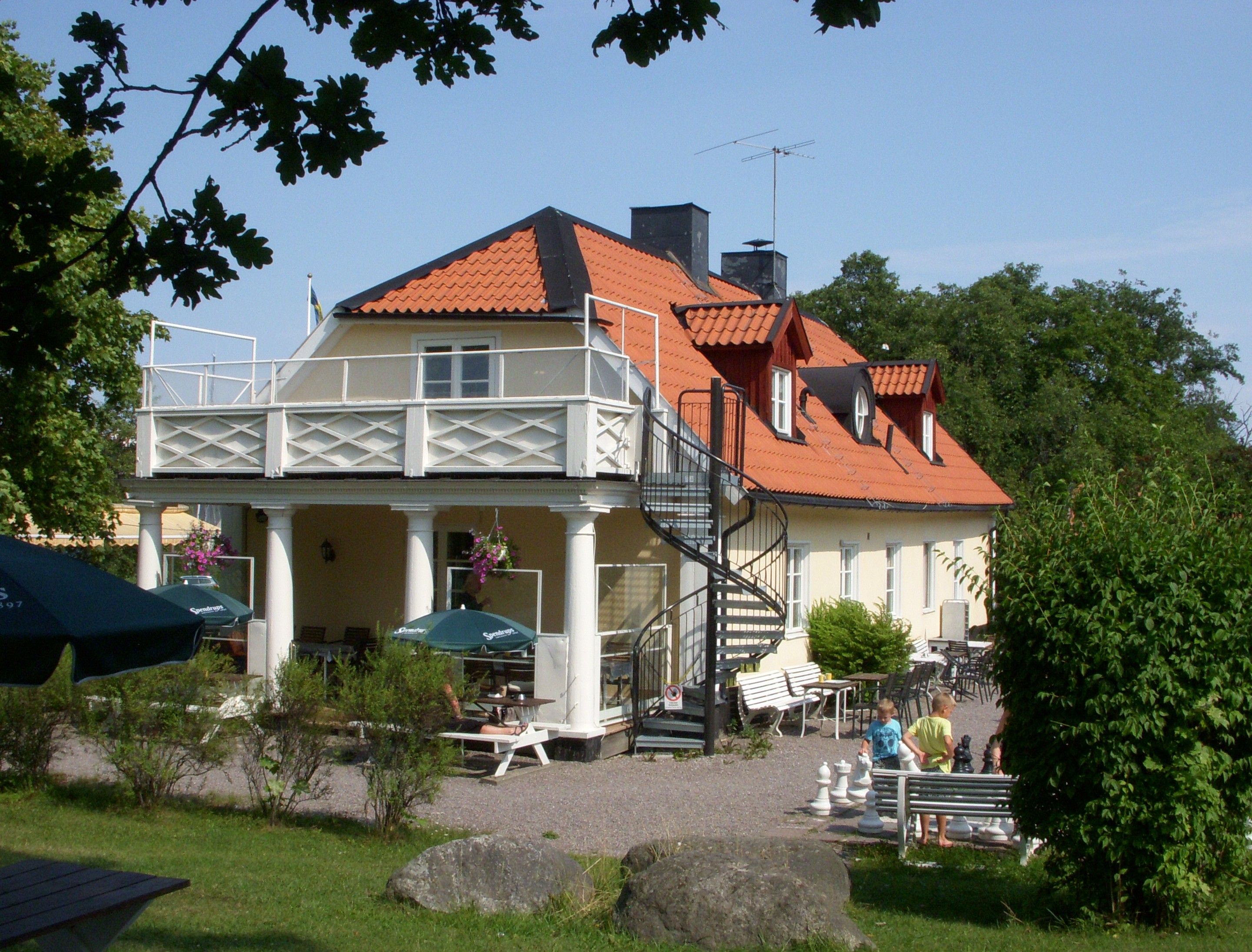 Brostugan på Kärsön, Ekerö kommun